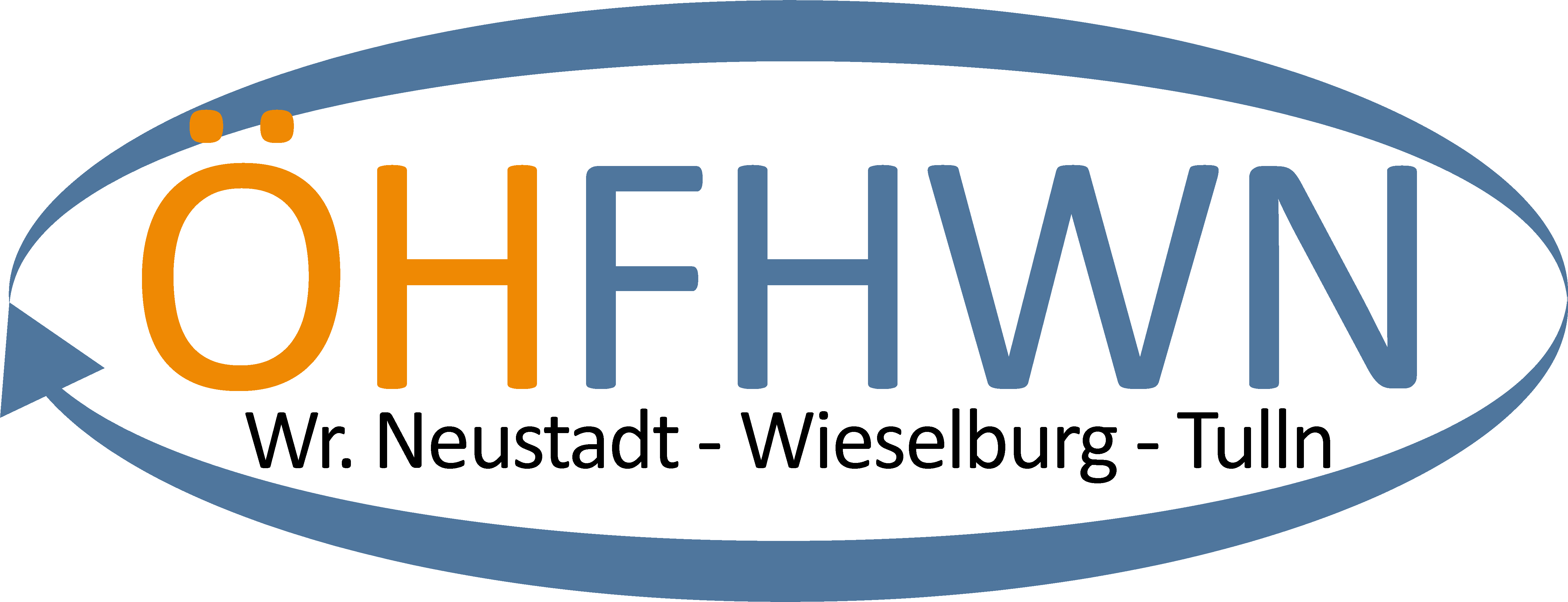 Das offizielle Logo der Hochschülerinnen- und Hochschulvertretung (Studierendenvertretung) der Fachhochschule Wiener Neustadt GmbH